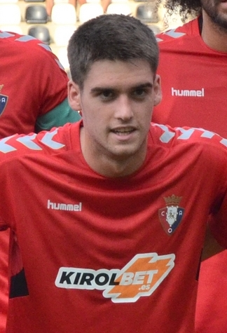 CSC_0149